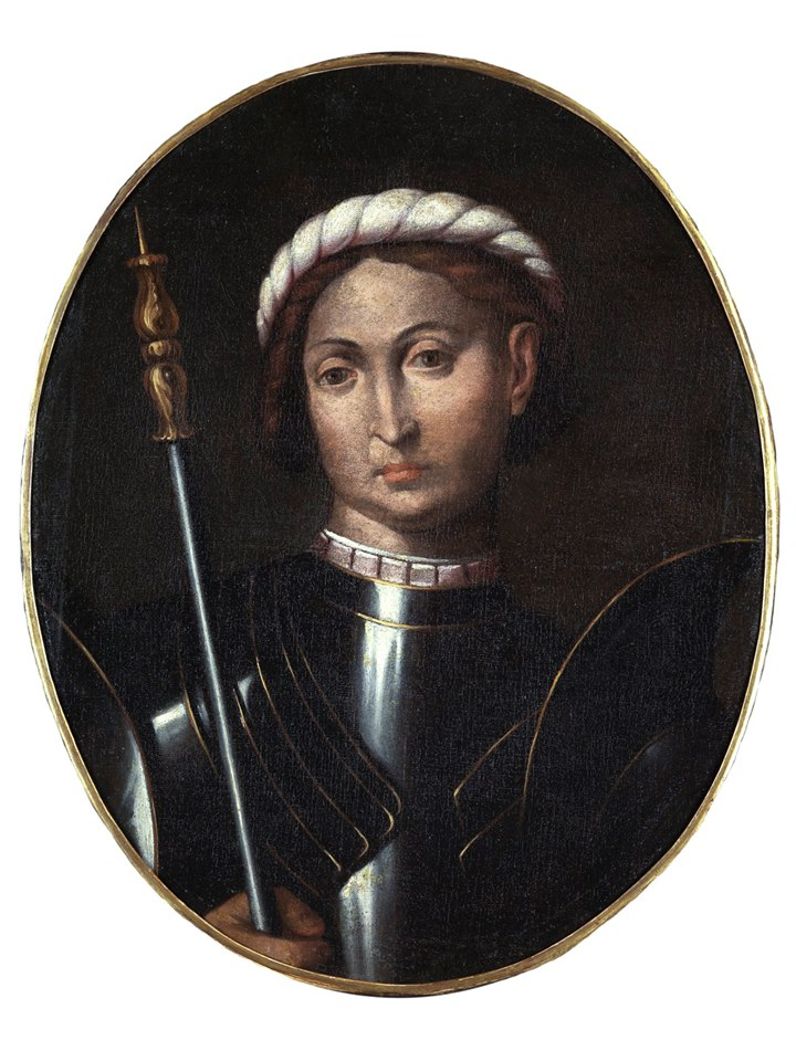 Ritratto di Francesco I Gonzaga